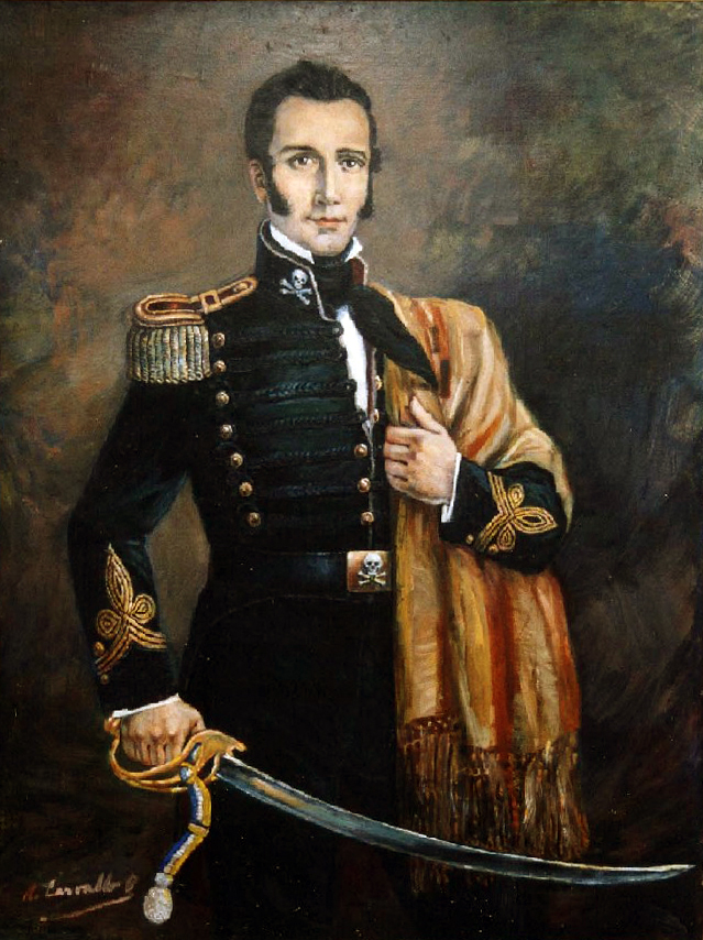 El héroe chileno Manuel Rodríguez, retratado por A. Carvalllo O.